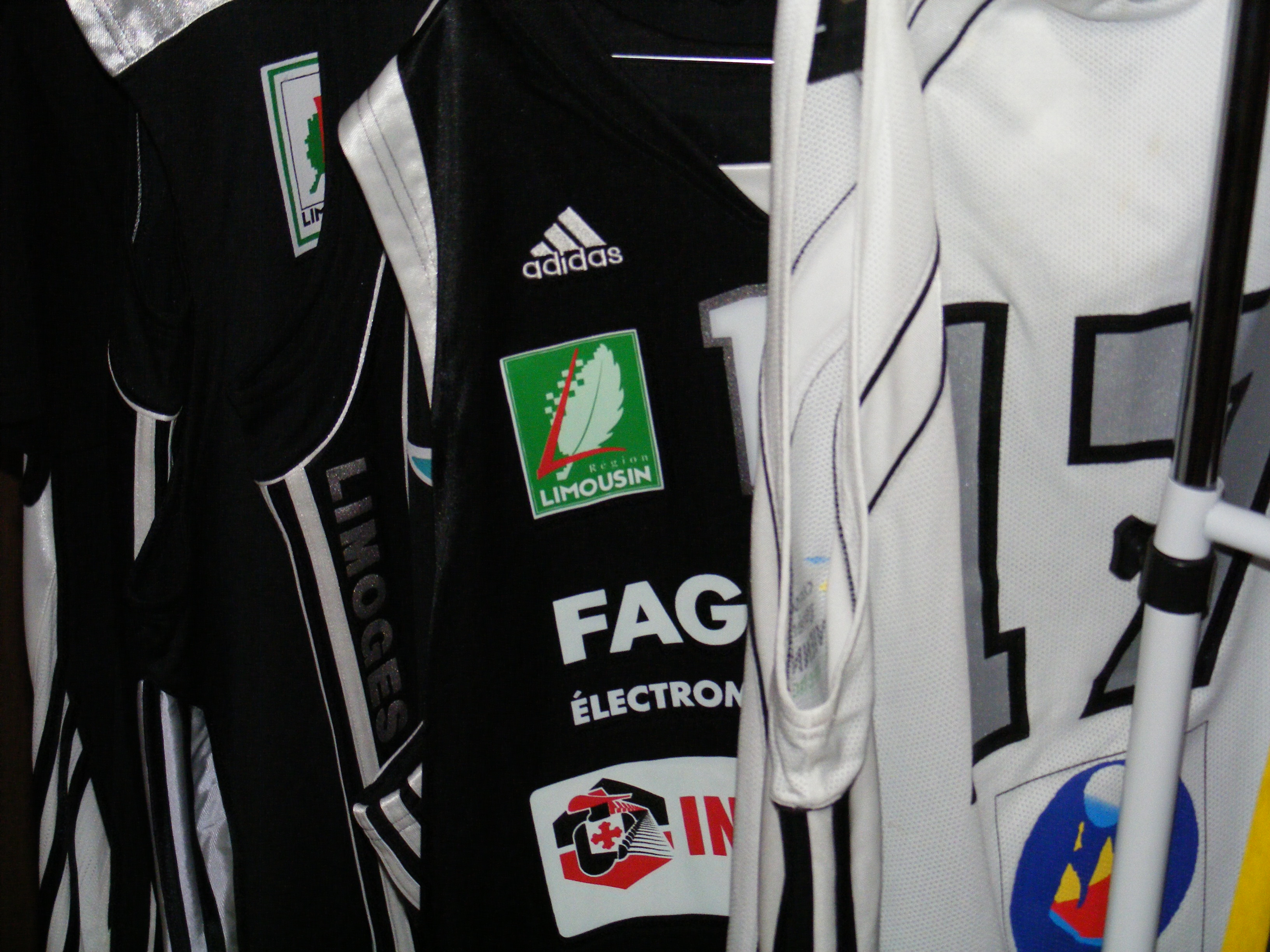 Le noir et blanc des maillots du Limoges CSP depuis 2004.